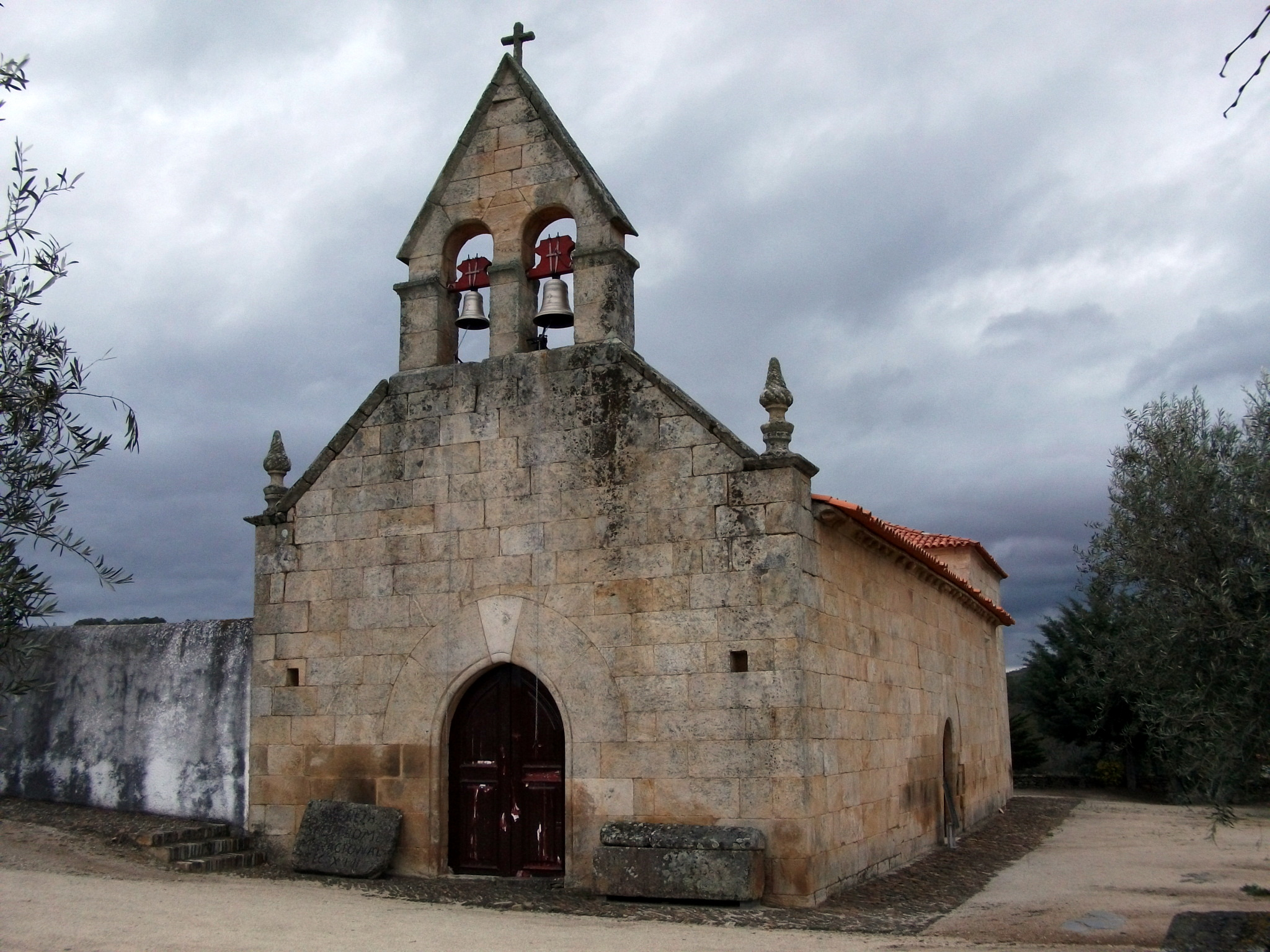 Fachadas frontal e lateral da Igreja de São Tomé, em Abambres, Mirandela.